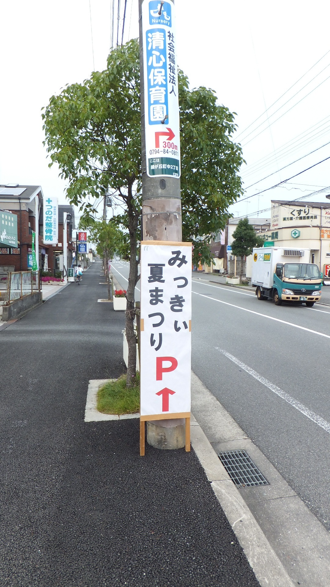 みっきぃ夏まつり 会場案内